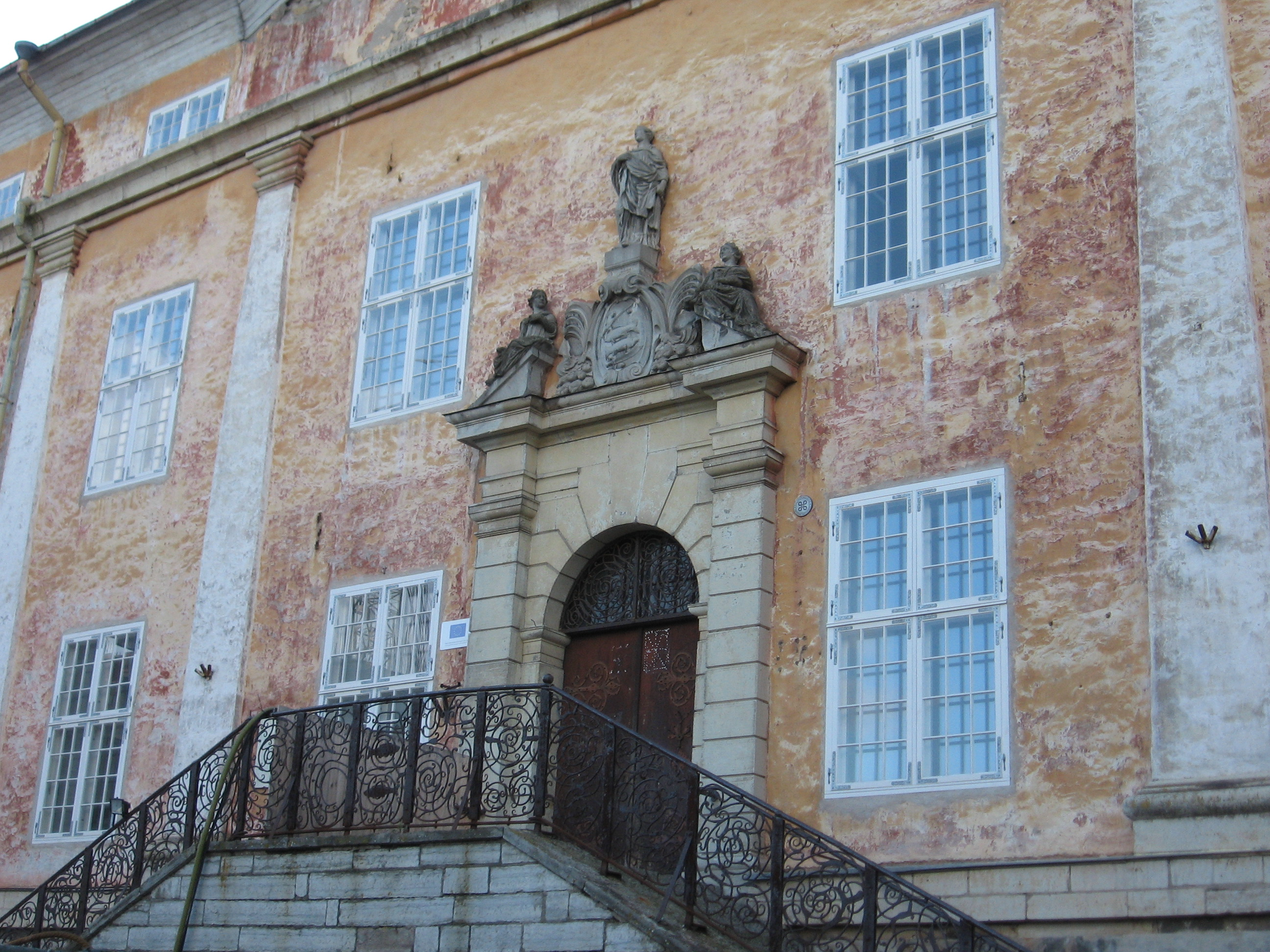 Narva raekoda. Sissepääs.